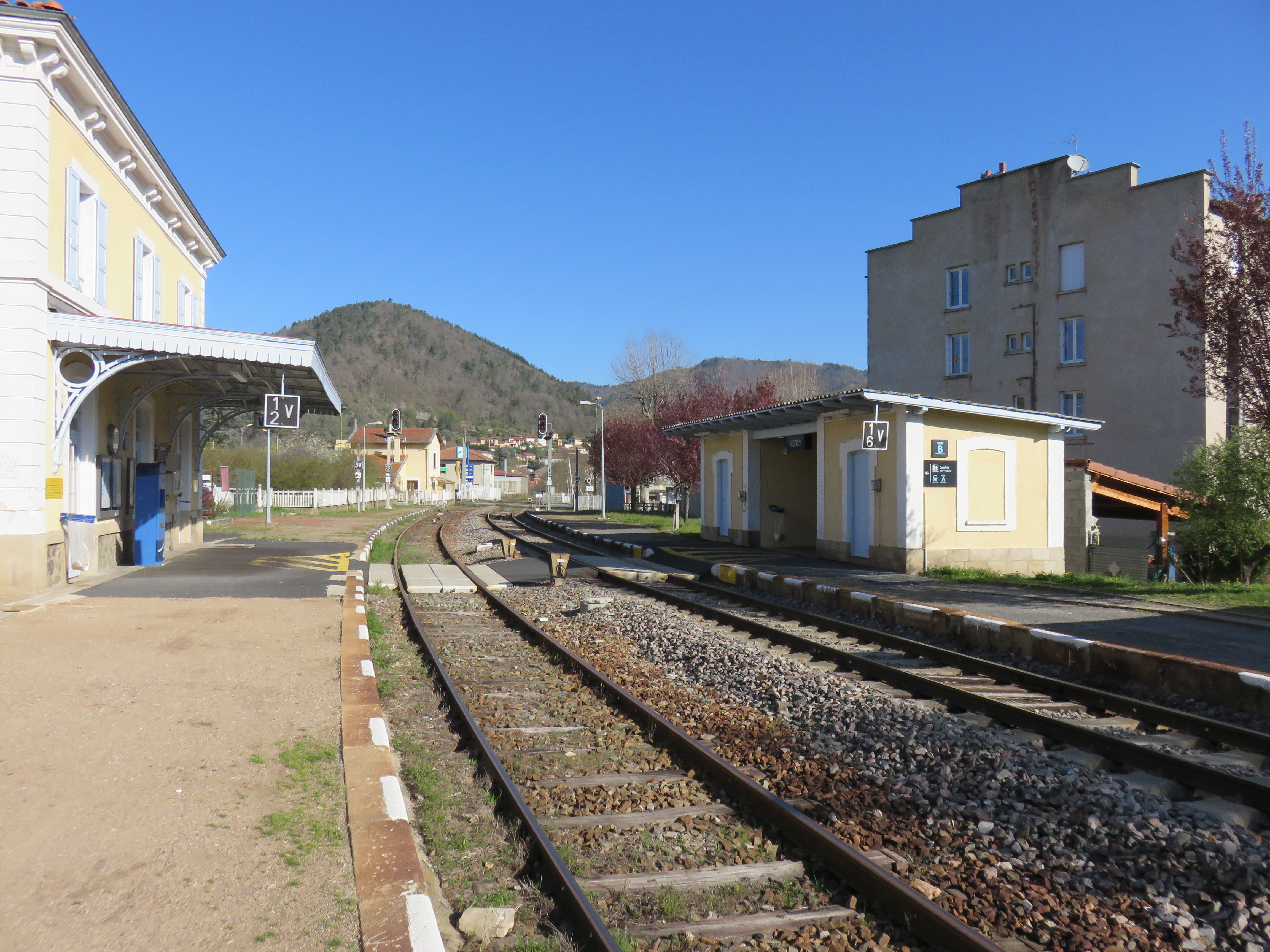 Vue des rails direction Saint-Étienne (nord) et de la gare de Vorey, en Haute-Loire.